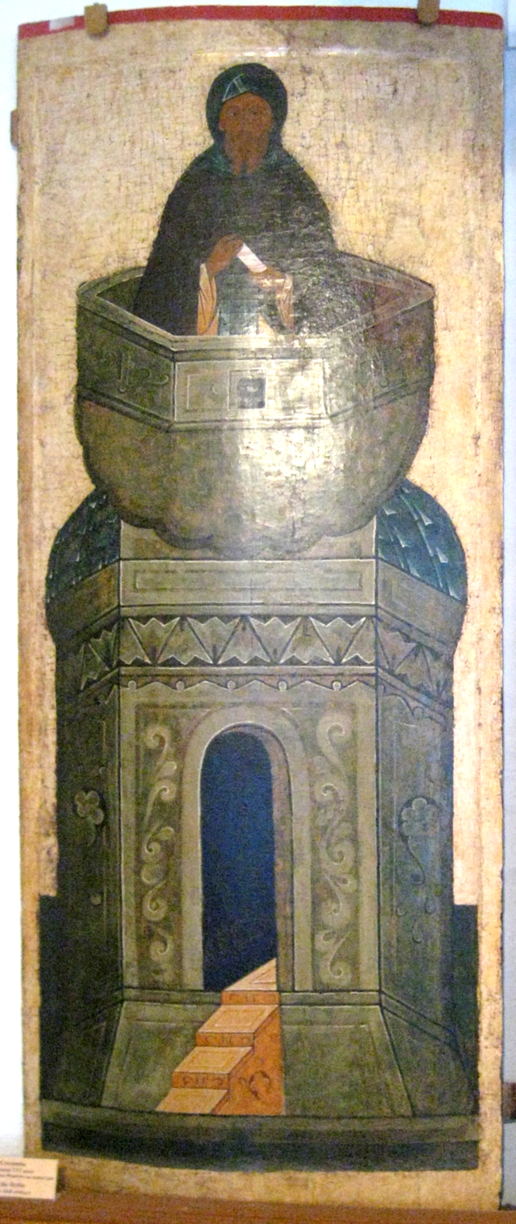 Даниил Столпник. Первая половина XVI века. Собор Рождества Богородицы Ферапонтова монастыря. Музей Кирилло-Белозерского монастыря.